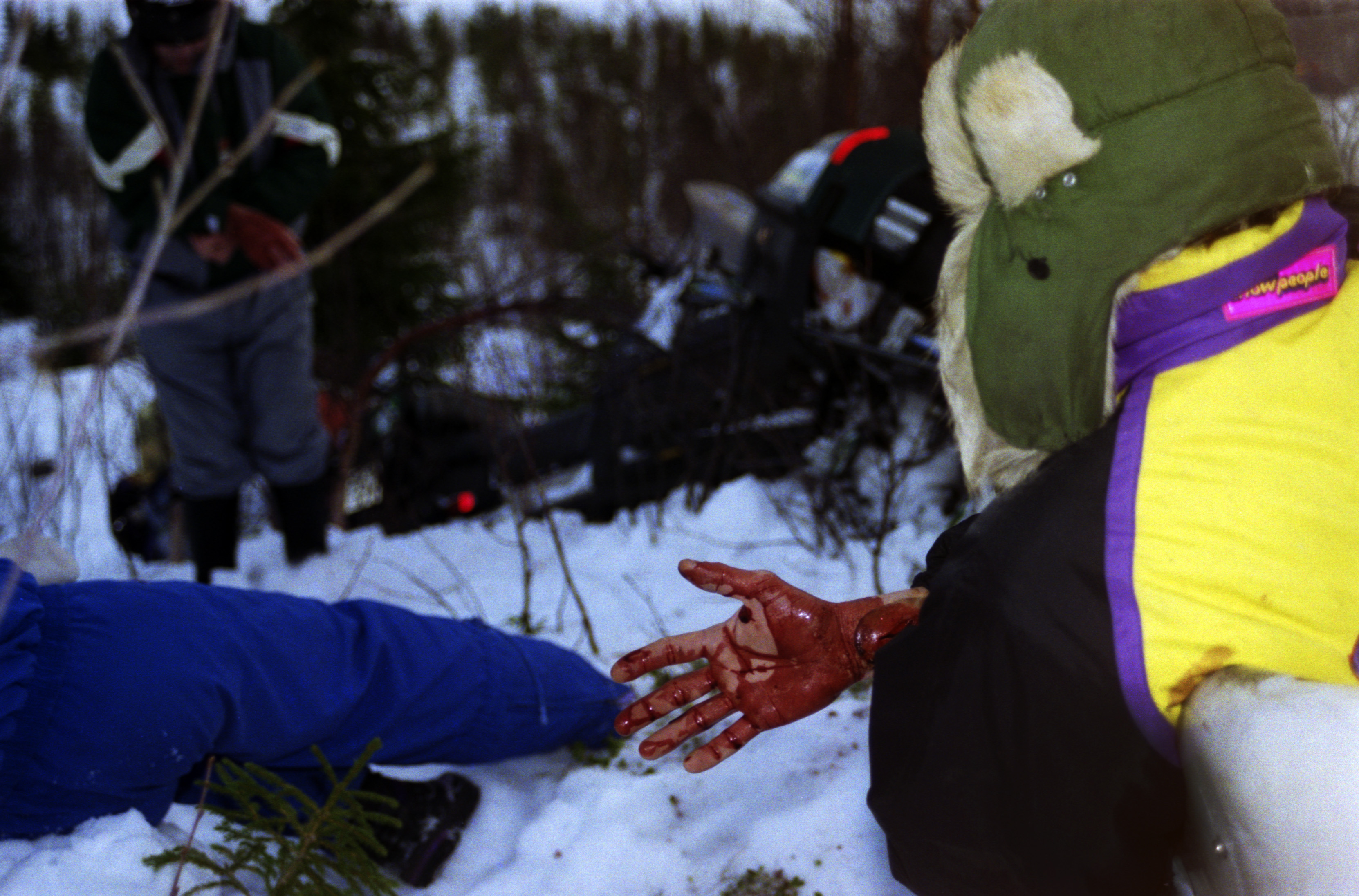 Fjällräddningsövning i Gräftåvallen, Oviksfjällen.